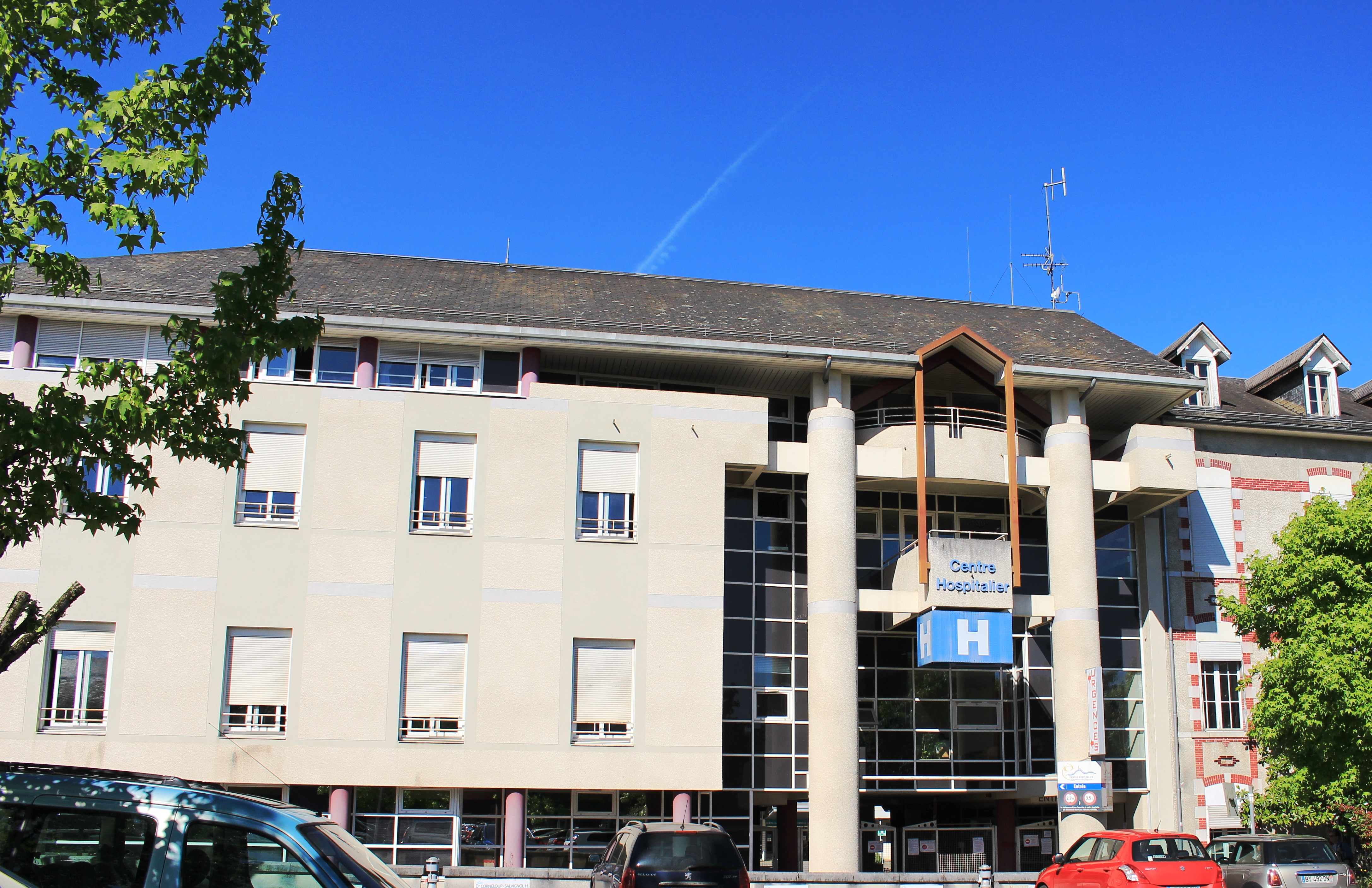 Hôpital de Bagnères-de-Bigorre (Hautes-Pyrénées)